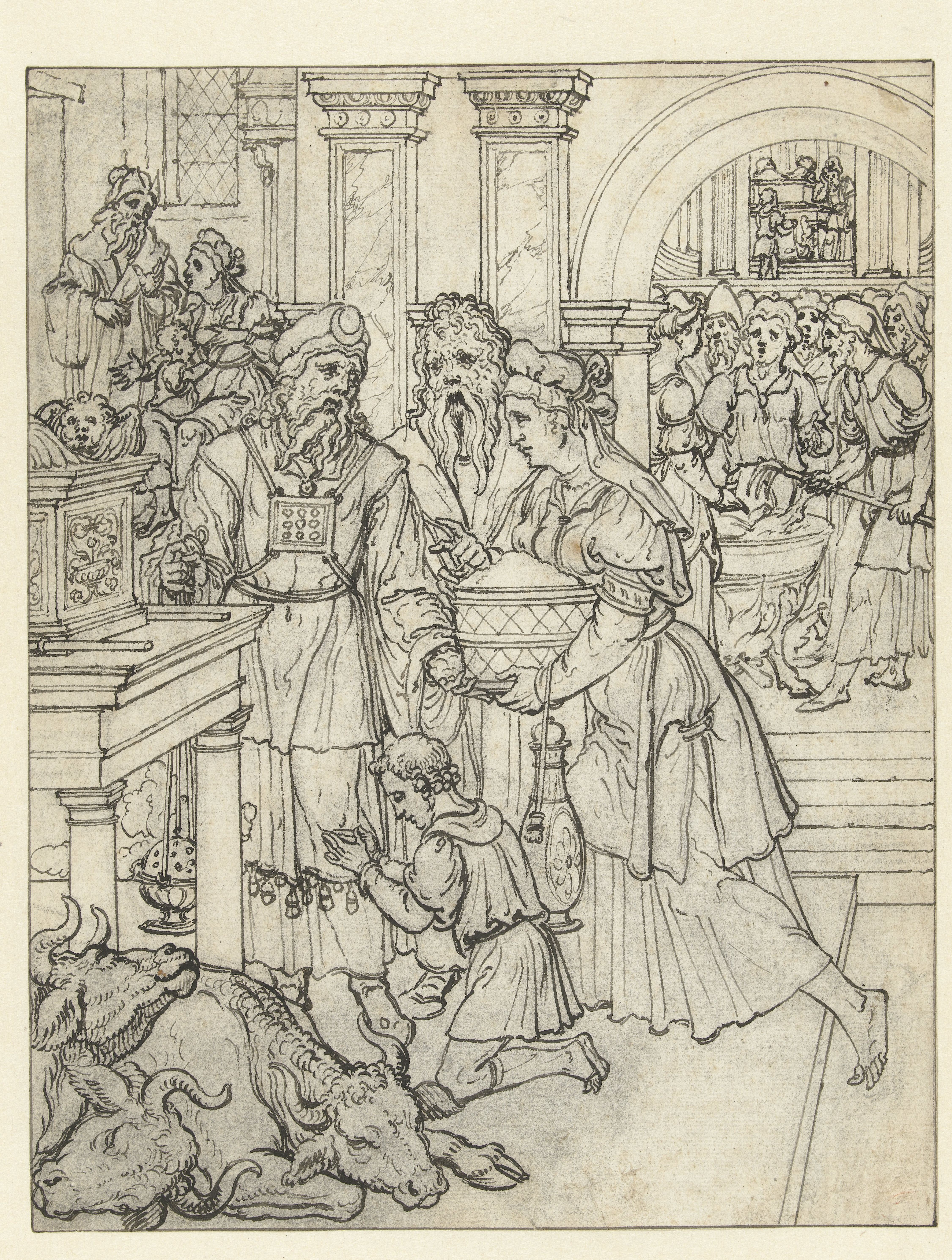 Samuel en zijn ouders voor de hogepriester Eli (ontwerp voor een gebrandschilderd glas in het huis "Pax huic domui" van de dijkgraaf en baljuw van Rijnland, Adriaan Dirksz van Crimpen, Leiden, 1543